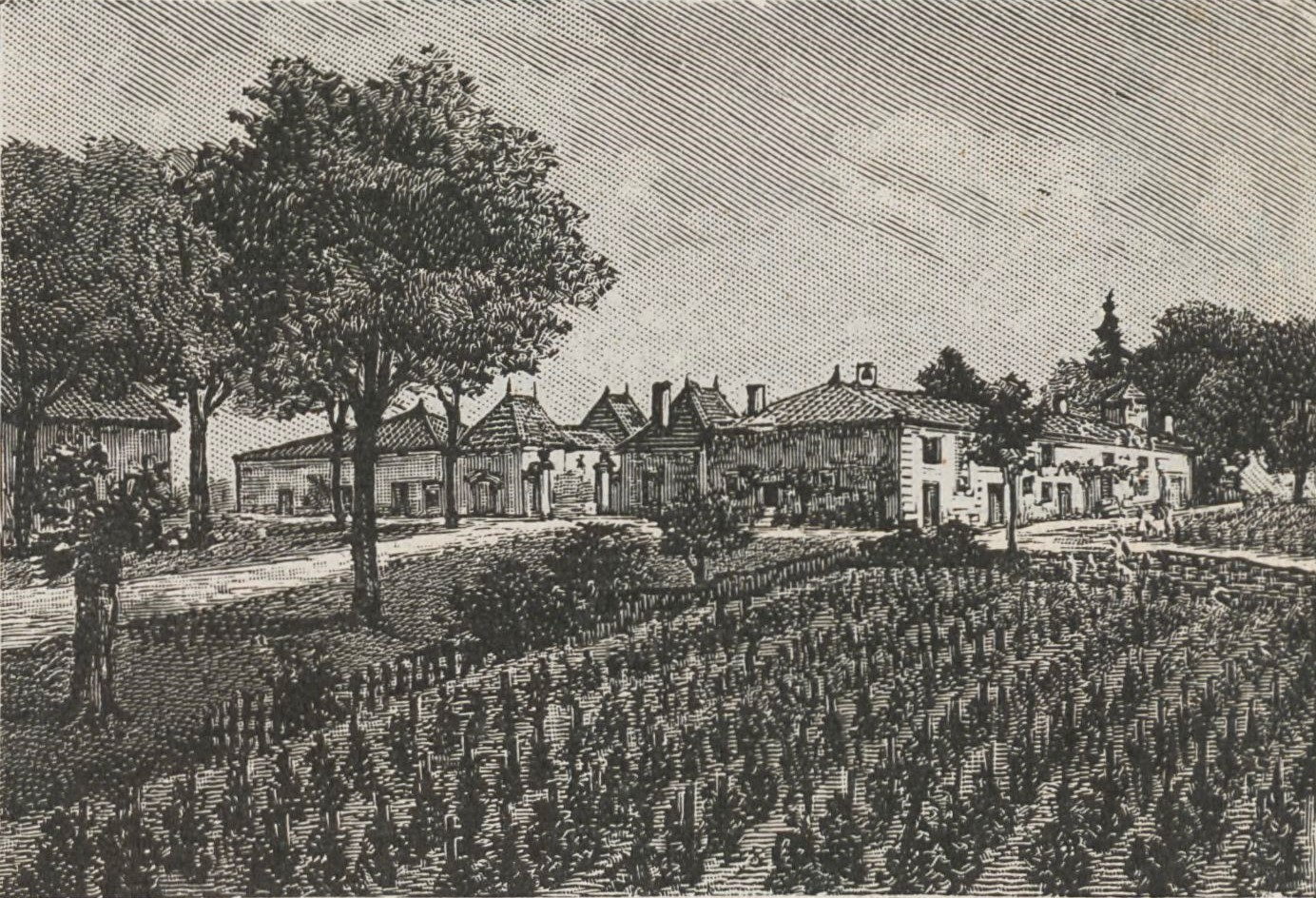 Illustration du château Sigalas-Rabaud dans l'ouvrage « Région de Sauternes et les vins blancs des cantons de Podensas et Langon » d'Édouard Féret publié en 1908